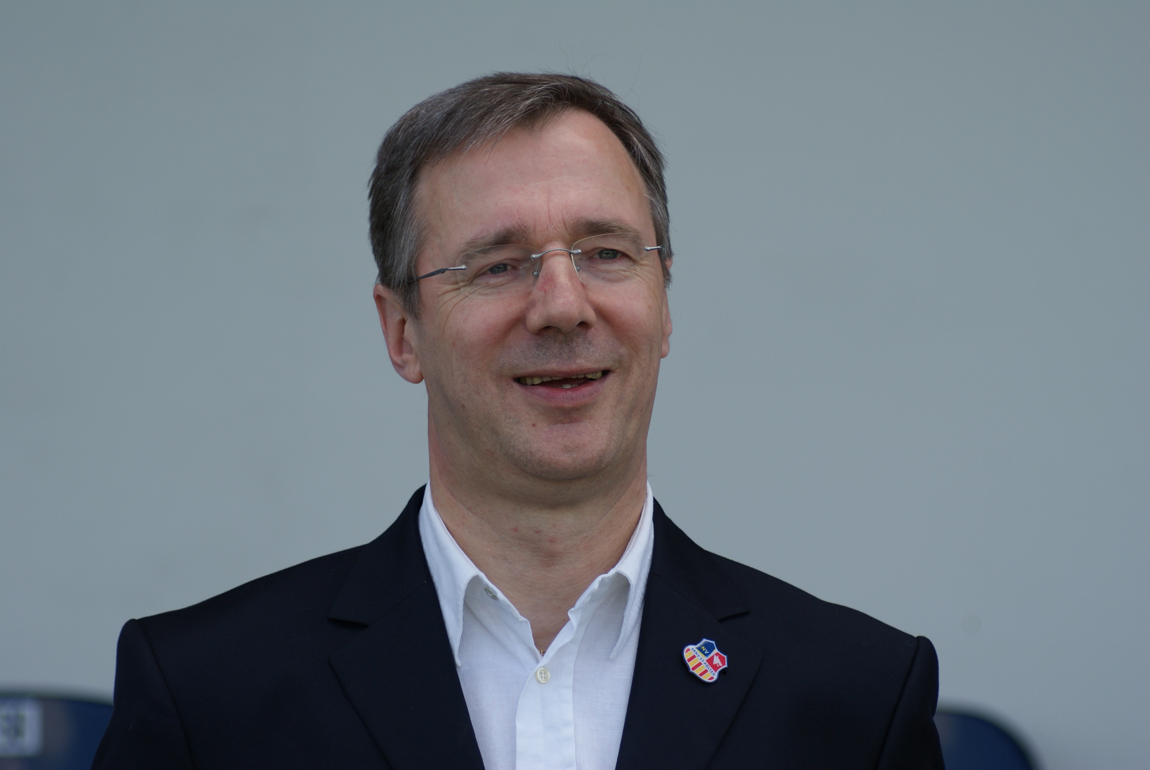 Gottfried Tröstl, SKNV St. Pölten.